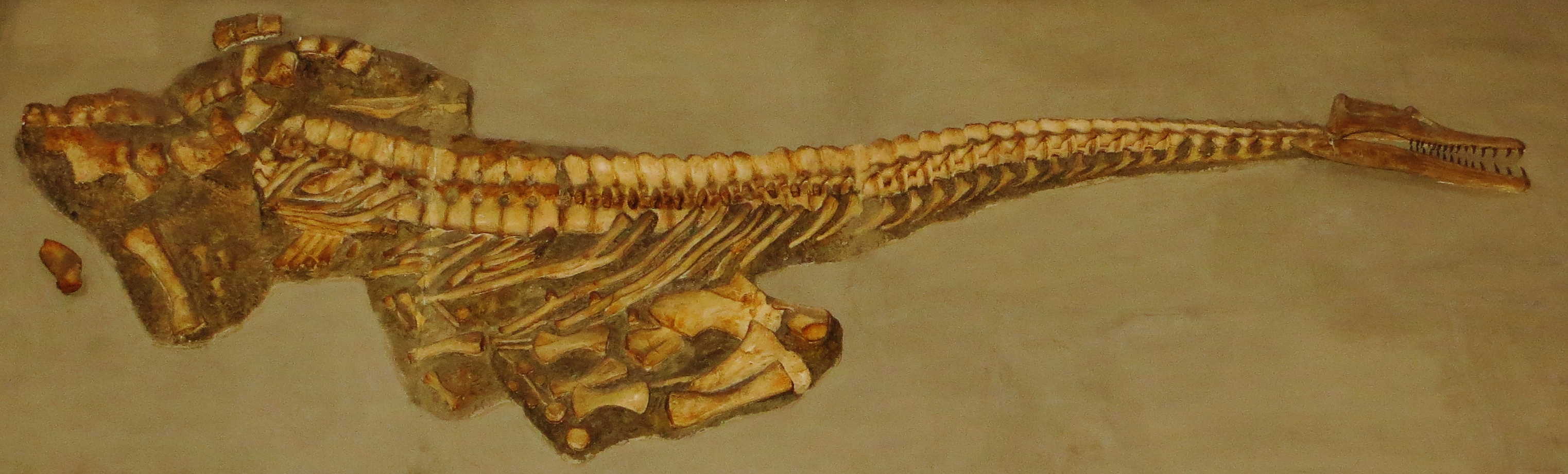 Fossil of Pistosaurus, an extinct reptile - Took the picture at Museum of Paleontology, Tuebingen